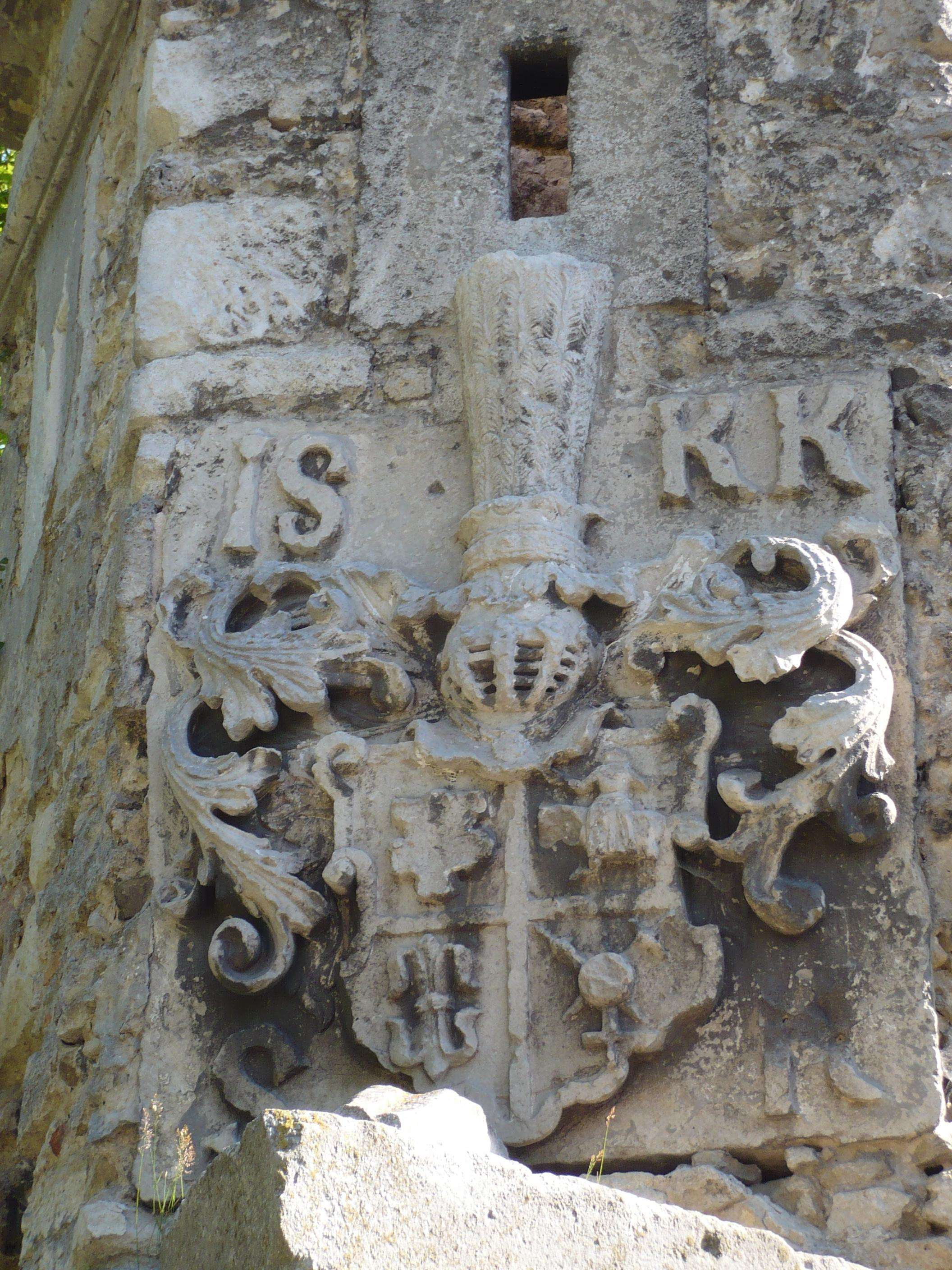 Tarcza herbowa na wieżyce bastionu zamku w Złoczowie